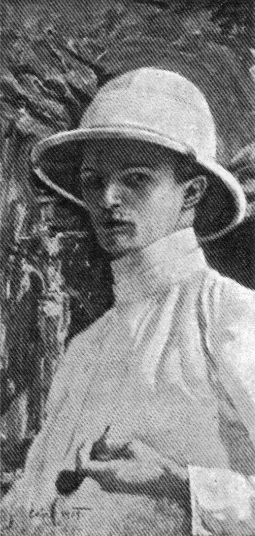 Autoportrét Miloše Slováka 1909